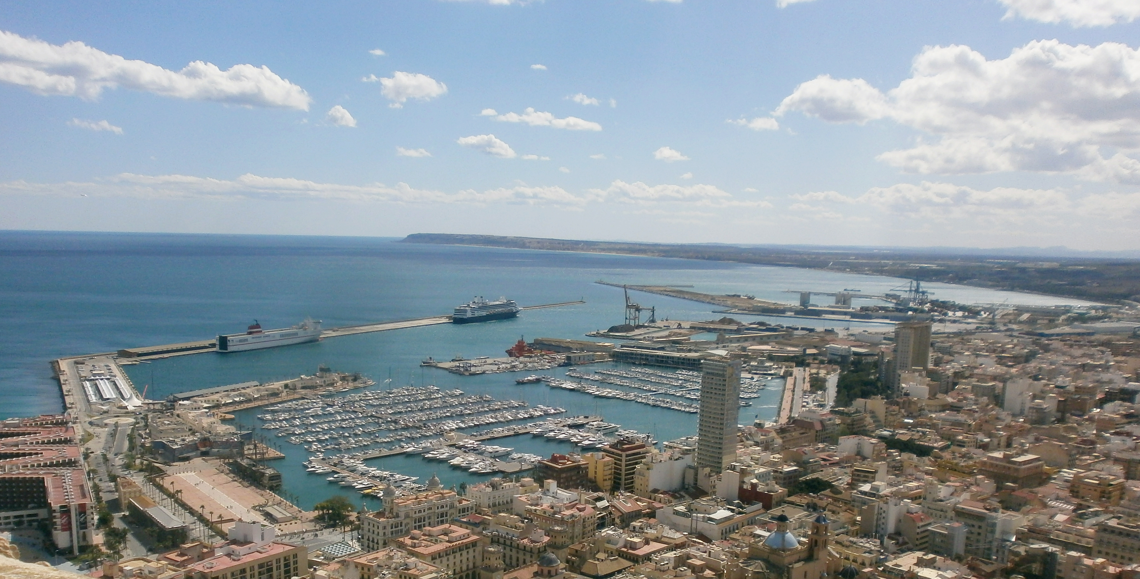 Vista del Puerto de Alicante desde el Castillo de Santa Bárbara.